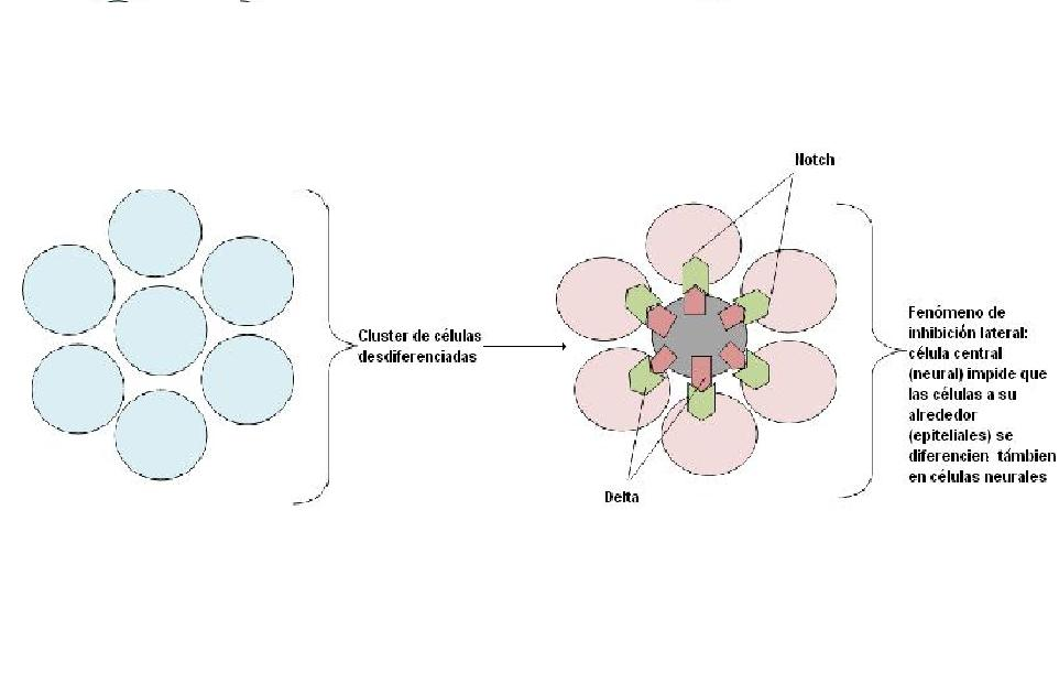 Fenómeno de inhibición lateral en Drosophila